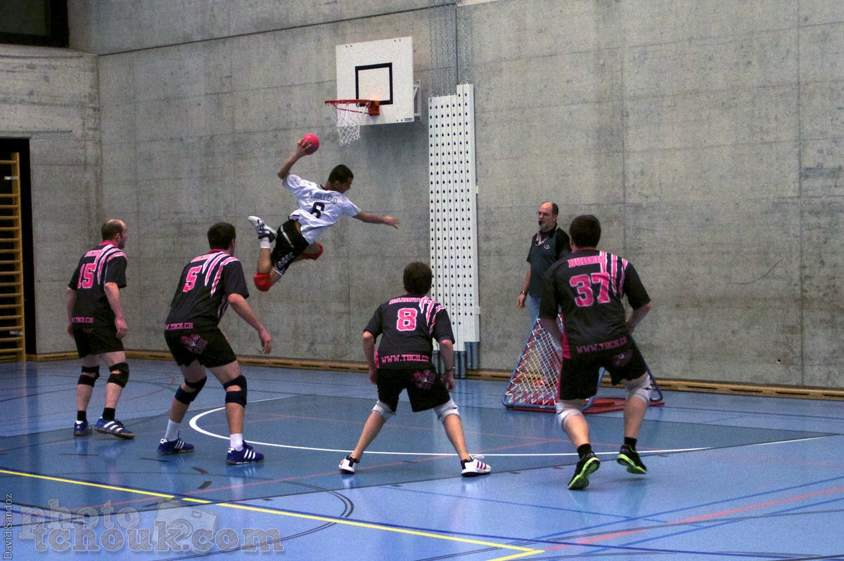 Match de championnat Vdr-Chambésy Saison 12-13 LNA